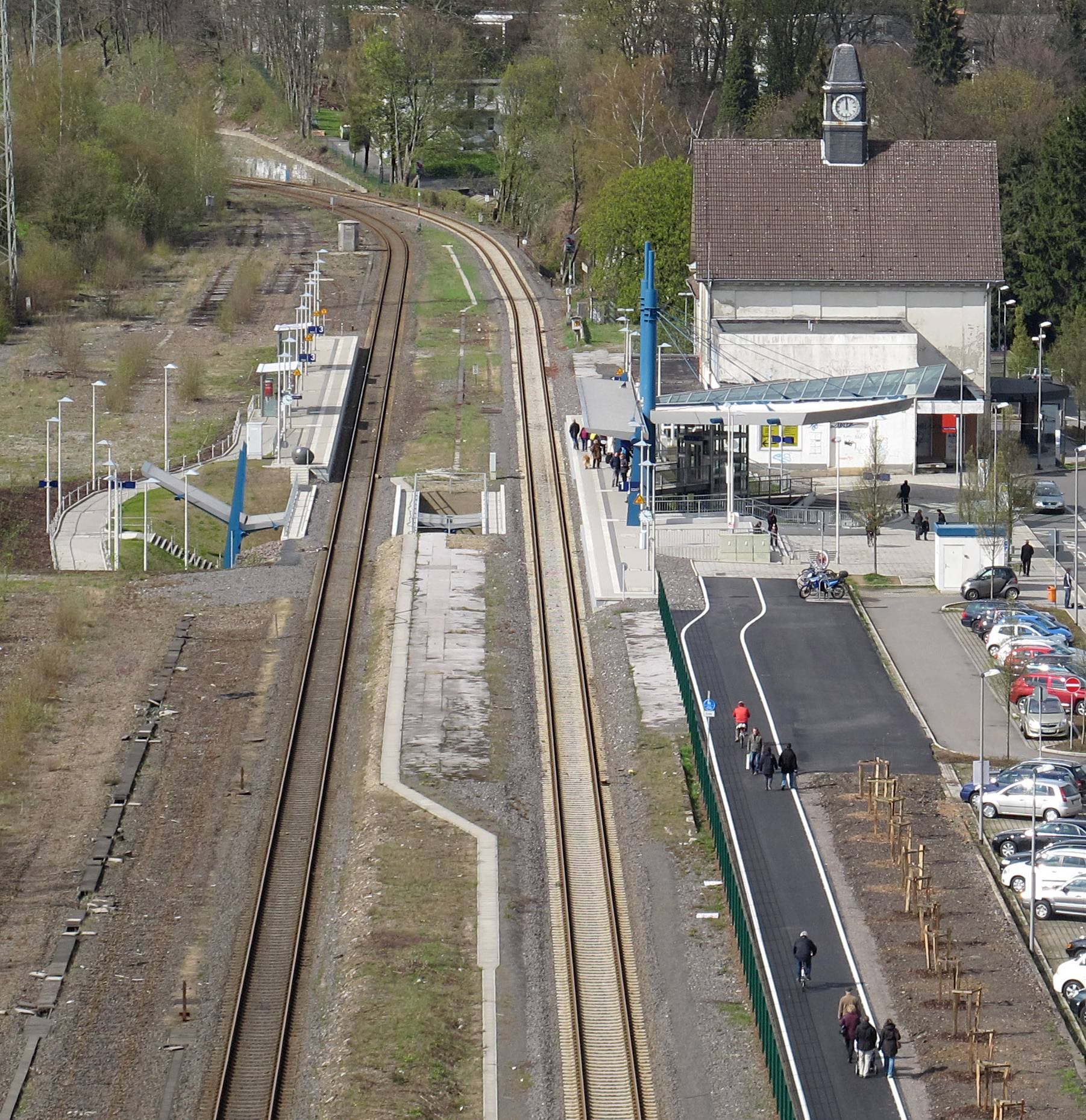 Bahnhof (eigentlich Haltepunkt) Remscheid-Lennep